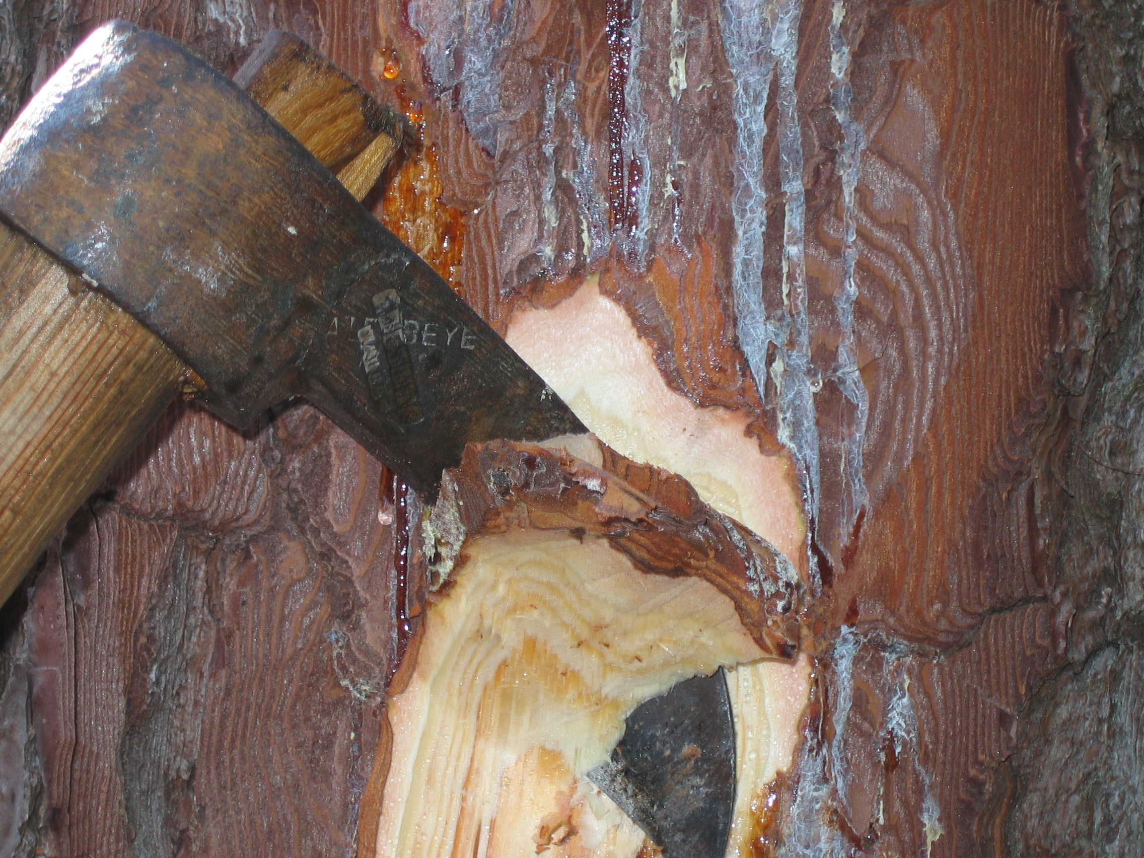 La pique: opération qui consiste à raviver la blessure sur le pin gemmé